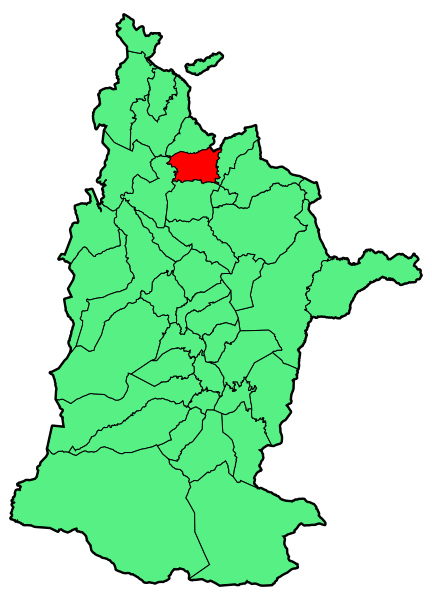 Aipaturiko udalerriaren kokapena Zuberoan